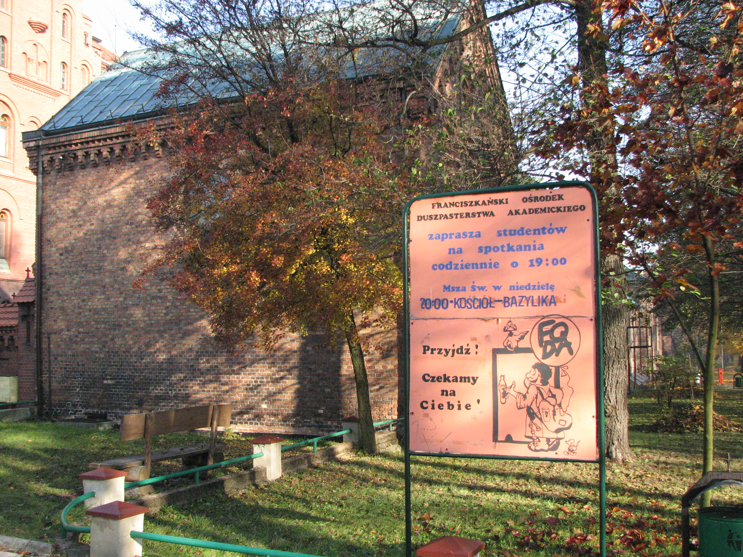 Academic Chaplaincy in Katowice Panewniki (Franciscan monastery)